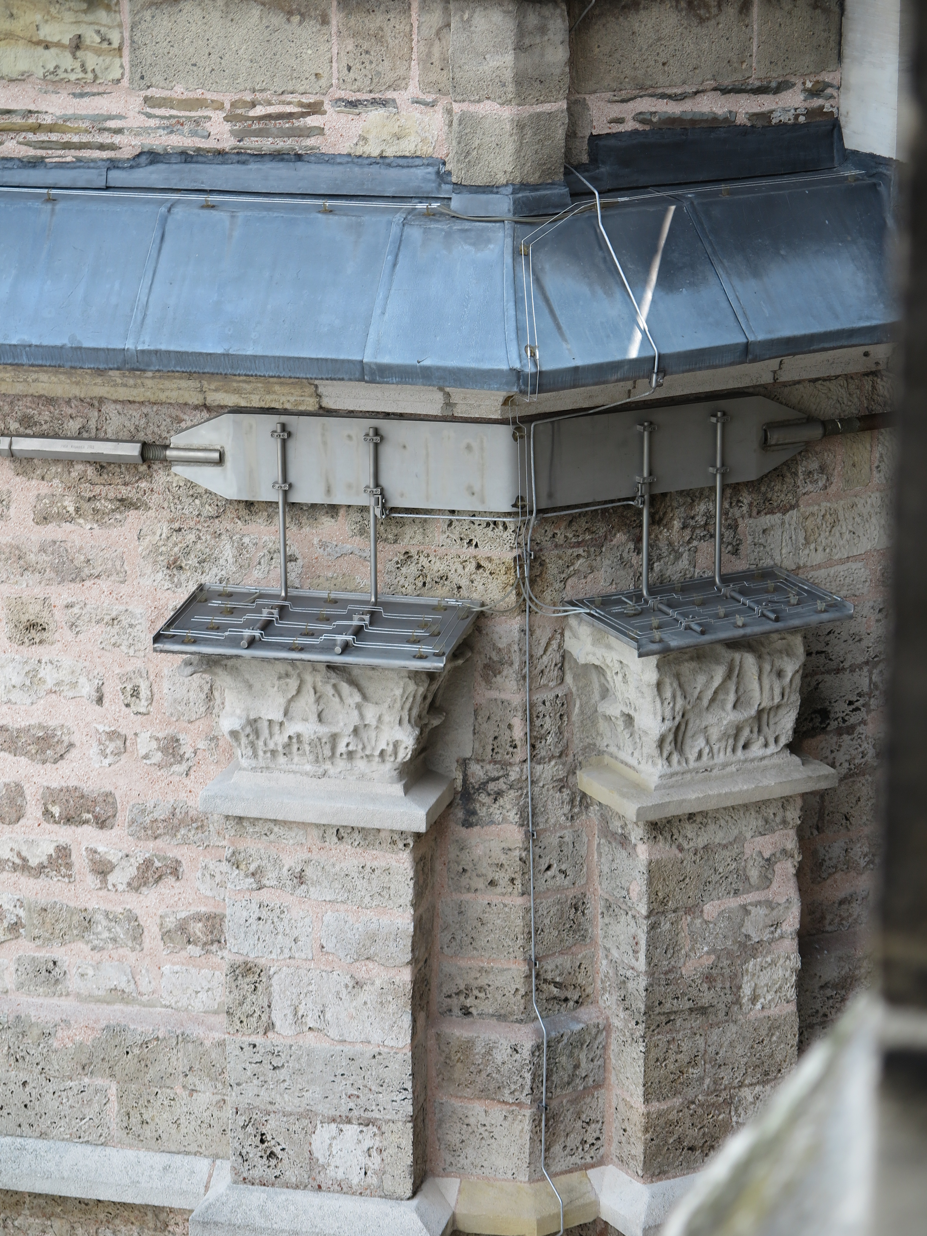 Detail des Ringankers am Oktogon des Aachener Doms, der die Last der Kuppel des Oktogons aufnimmt.